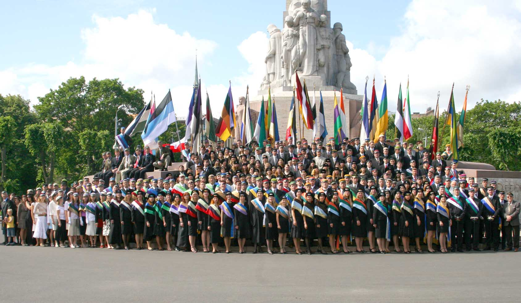 Präsidenkonvent und Damenverbindungen an der Freiheitsstatue in Riga